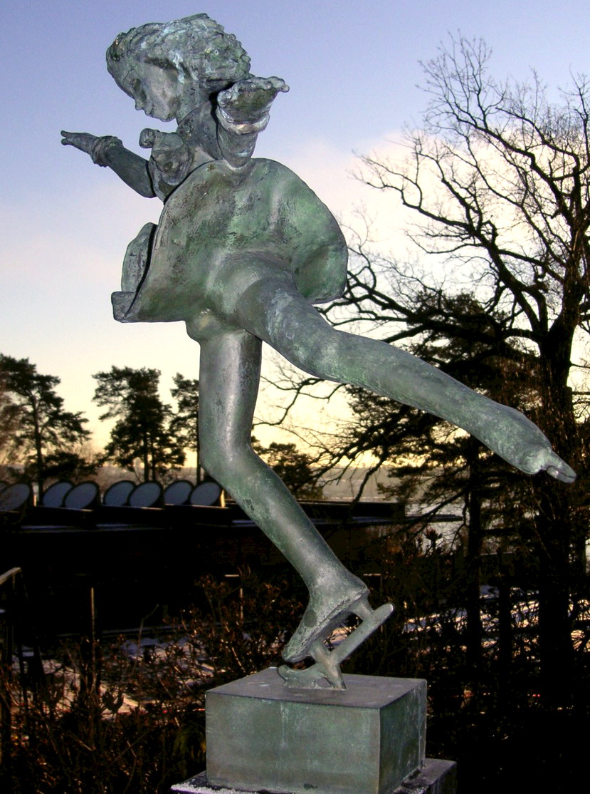 Carl Milles "Skridskoprinsessan"